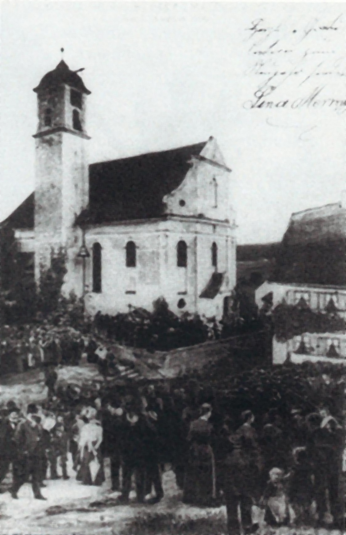 Weihe einer neuen Glocke, St. Ulrich Amendingen